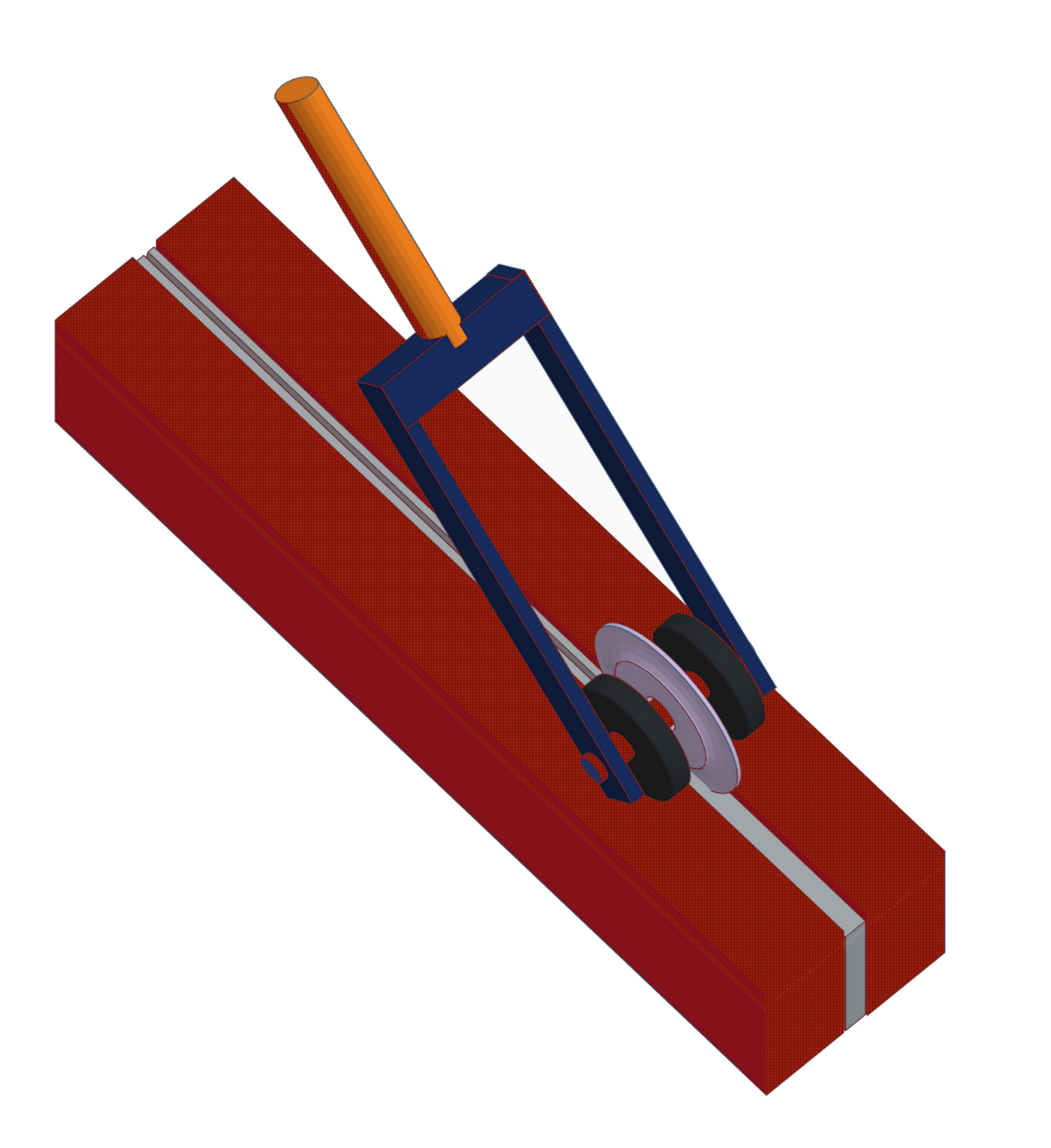 Metselgereedschap, dagge, modern